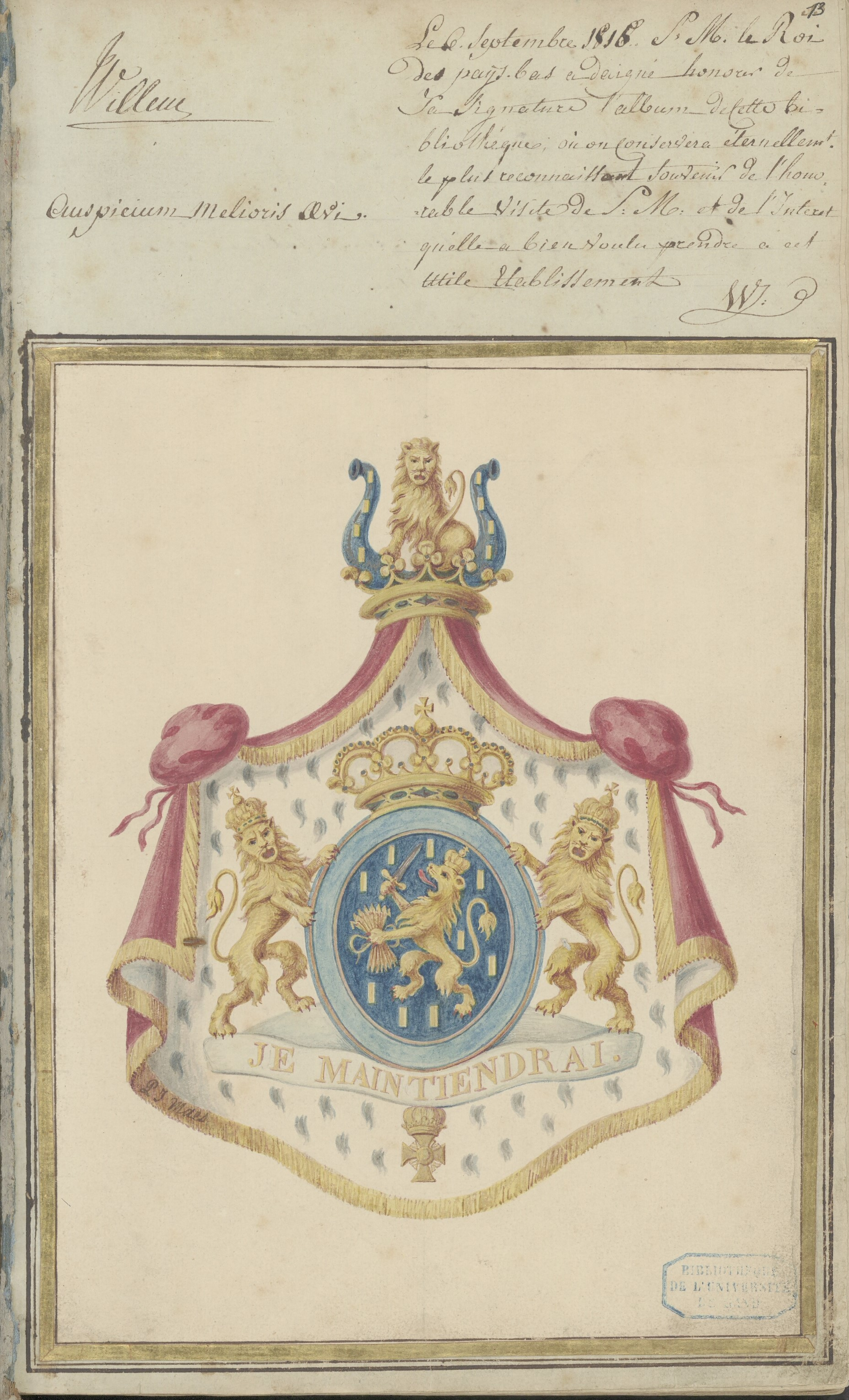 Guldenboek van Stads- en universiteitsbibliotheek van Gent begonnen in 1814